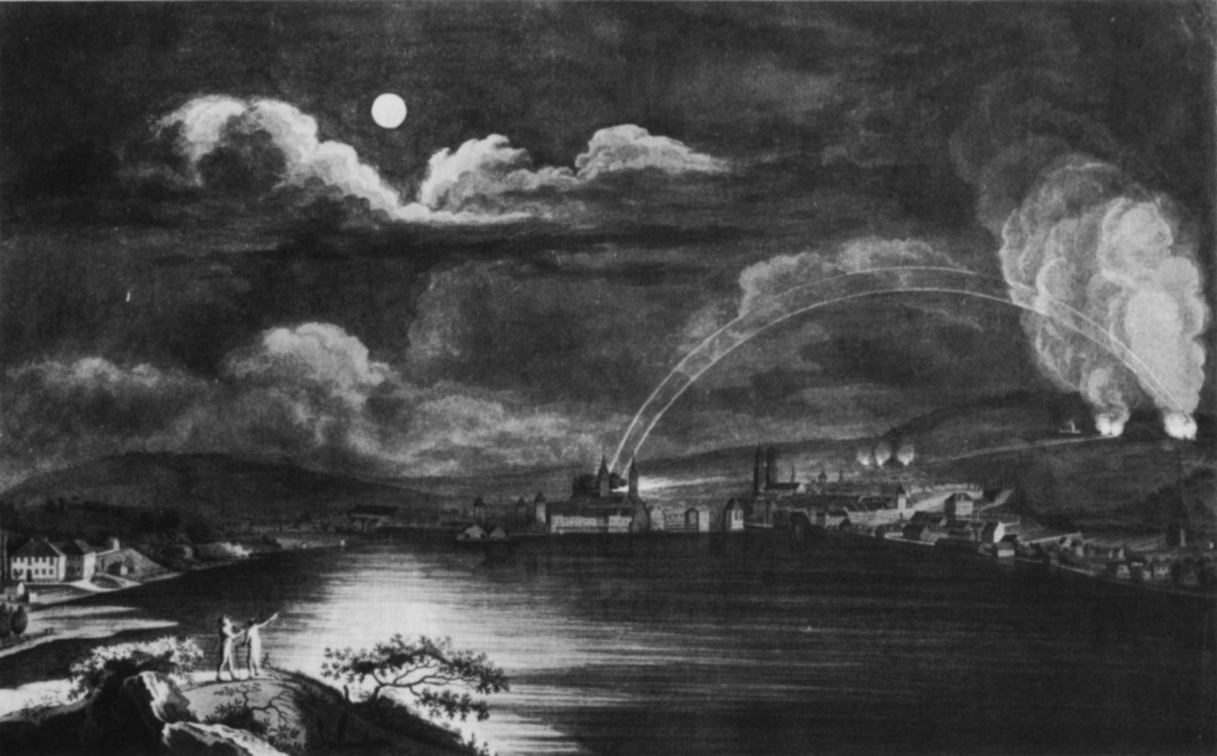 Die Zweite Beschiessung von Zürich durch den helvetischen General Andermatt in der Nacht vom 12. auf den 13. September 1802 zu Beginn des Stecklikrieges auf einer zeitgenössischen Darstellung